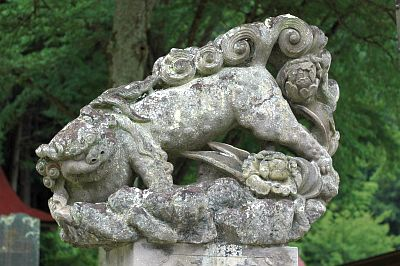 古殿八幡神社の狛犬。小林和平・作。昭和7年。